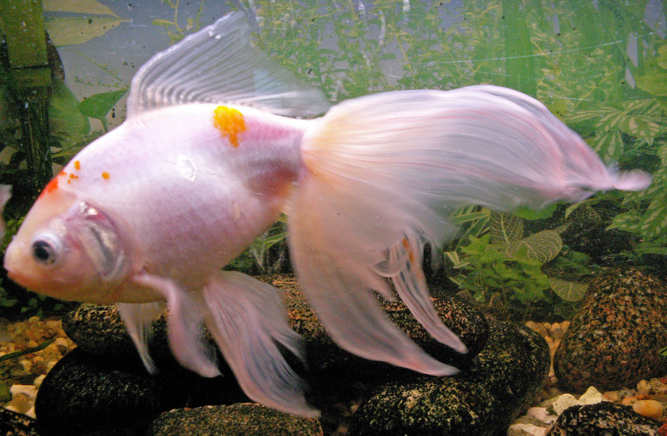 Welon – odmiana karasia ozdobnego, zwanego potocznie złotą rybką.